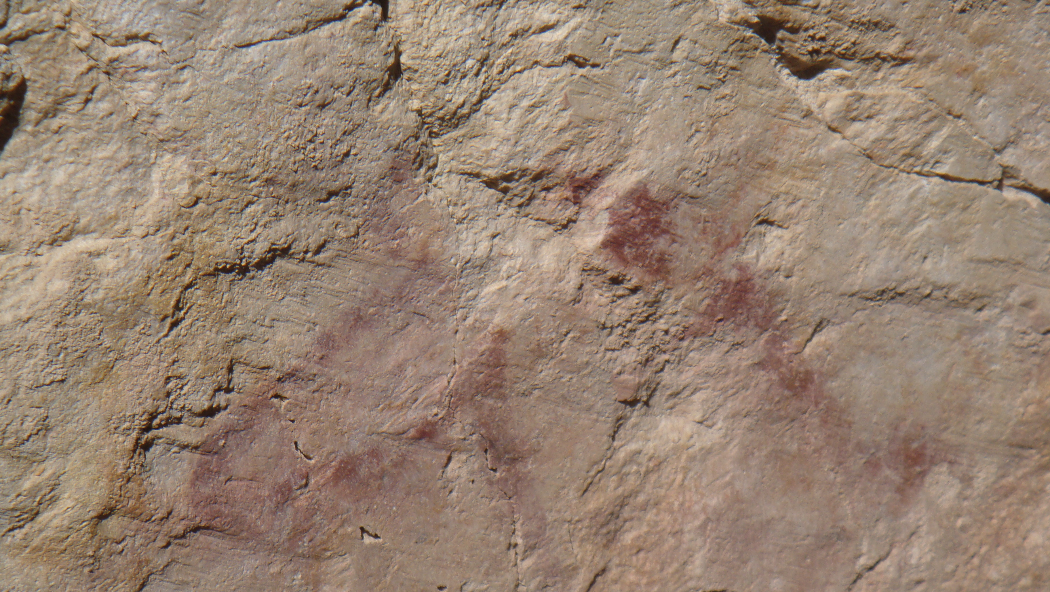 Caballo en ocre rojo solutrense, en Cueva Ambrosio (Almeria, España)